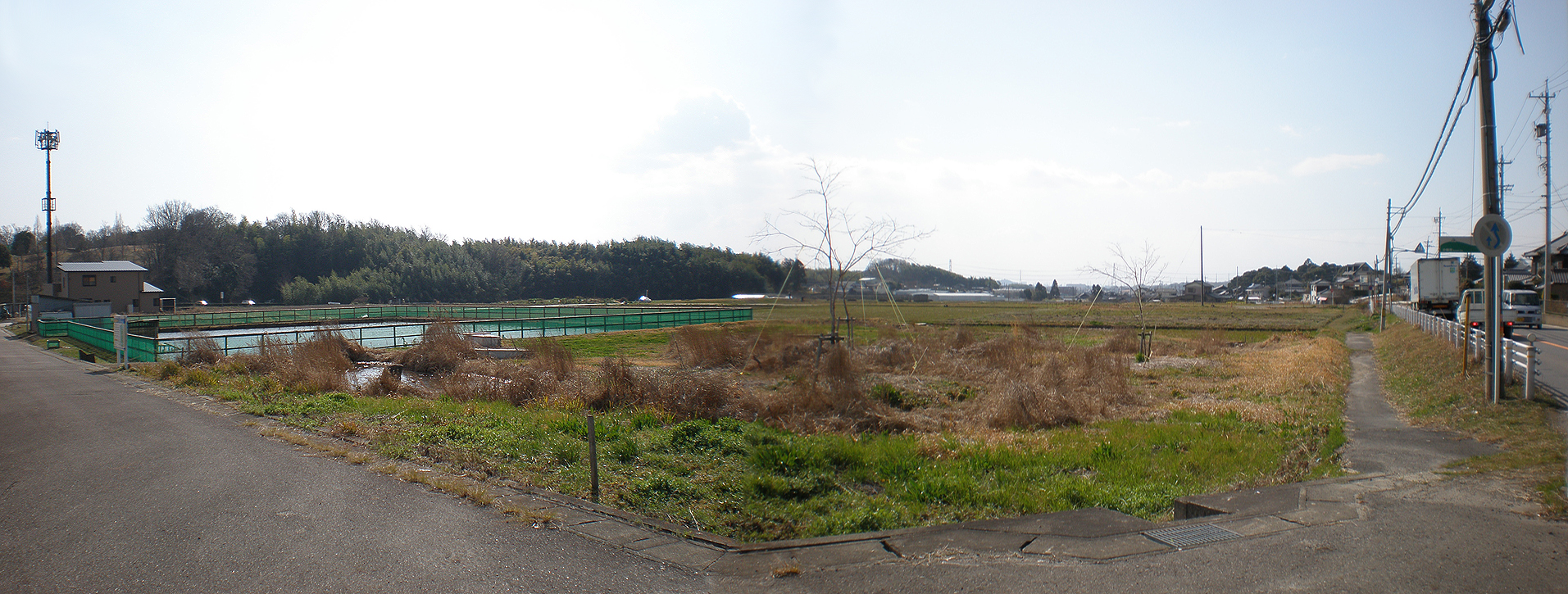 愛知県小牧市にあるわくわく体験広場のパノラマ写真（ソフトウェアにて合成）